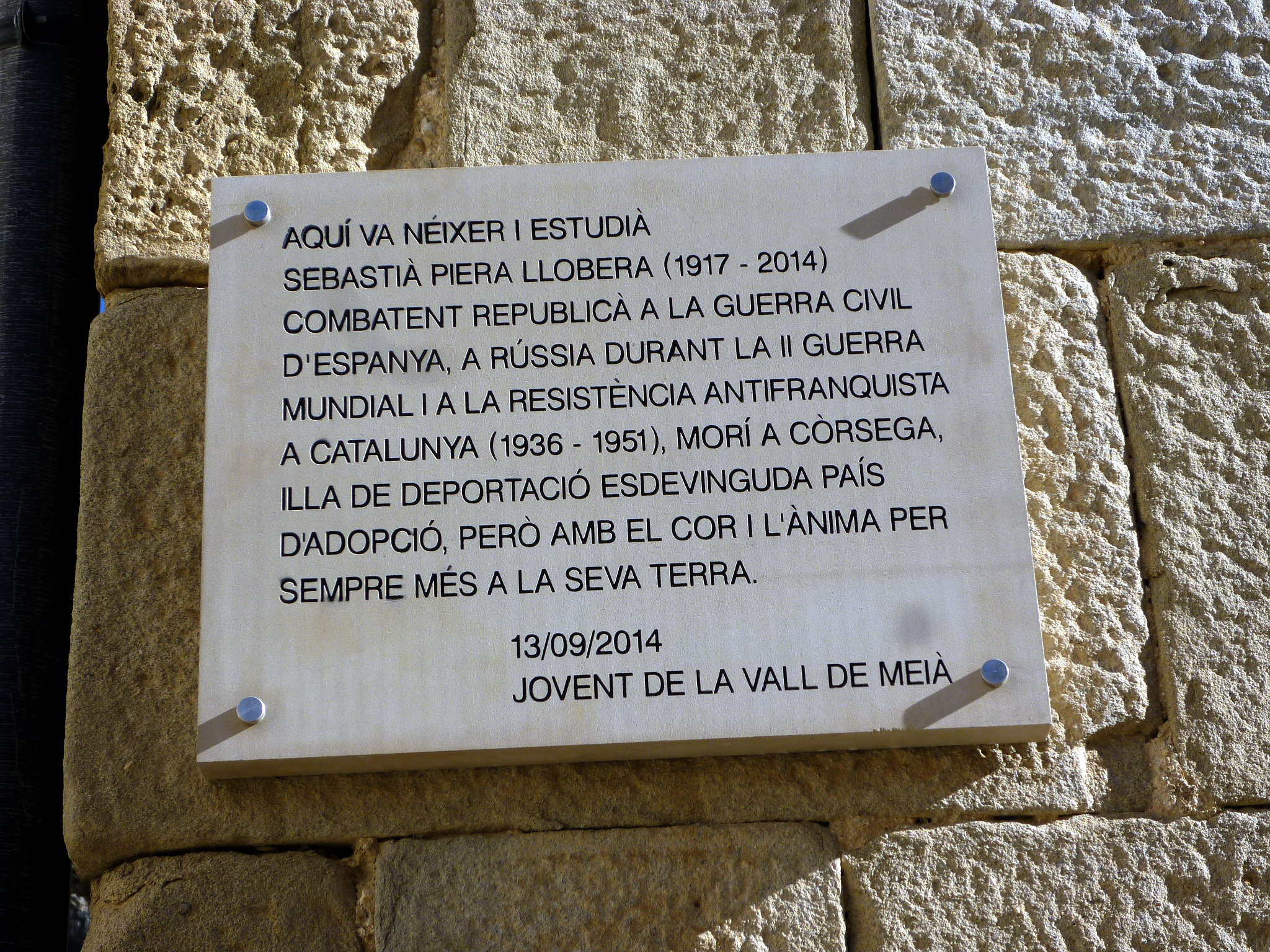 Casa de la Vila de Santa Maria de Meià (Vilanova de Meià): placa commemorativa